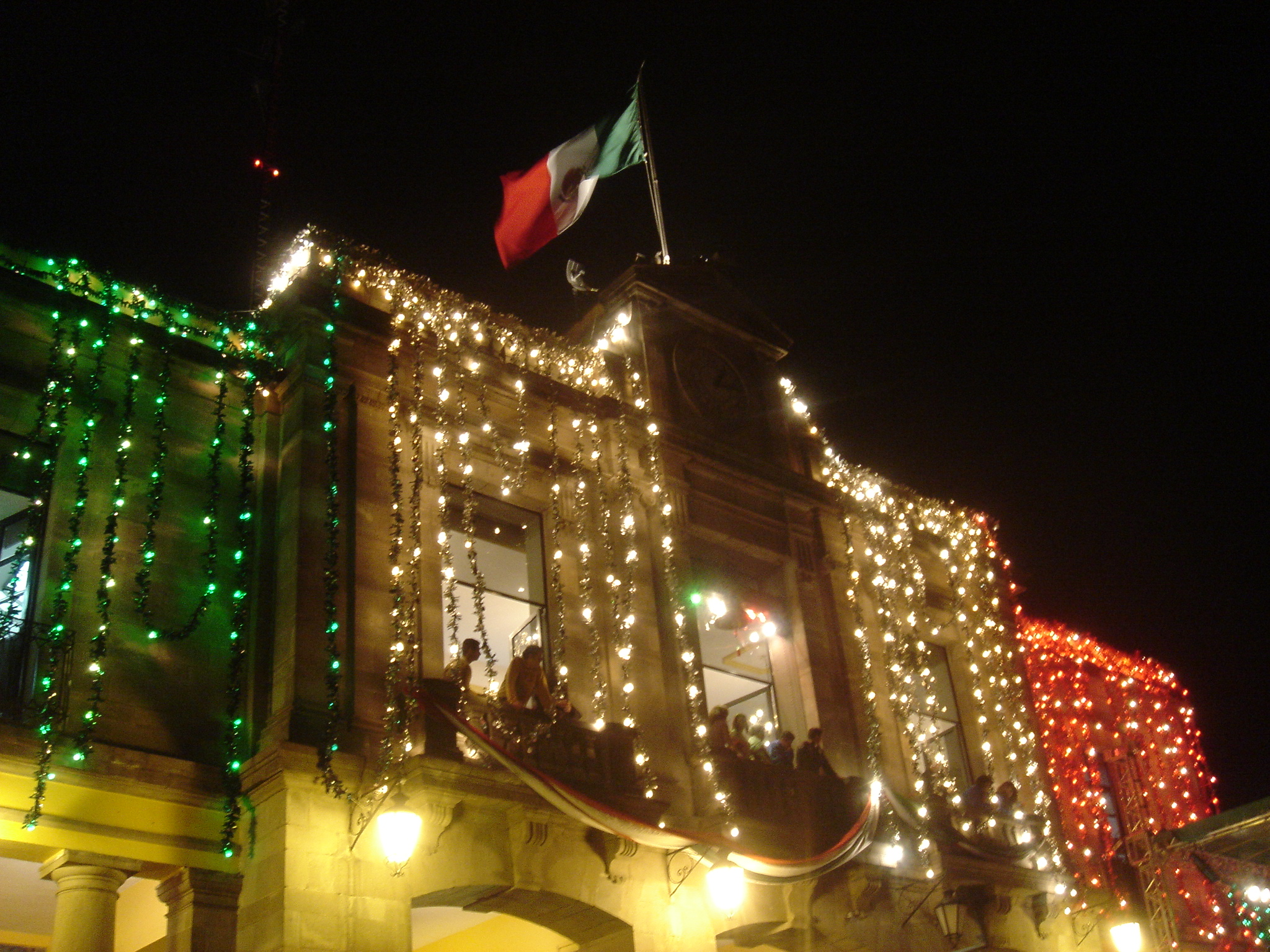 Palacio en Tlalpan, D.F., México en la Noche del Grito de Independencia